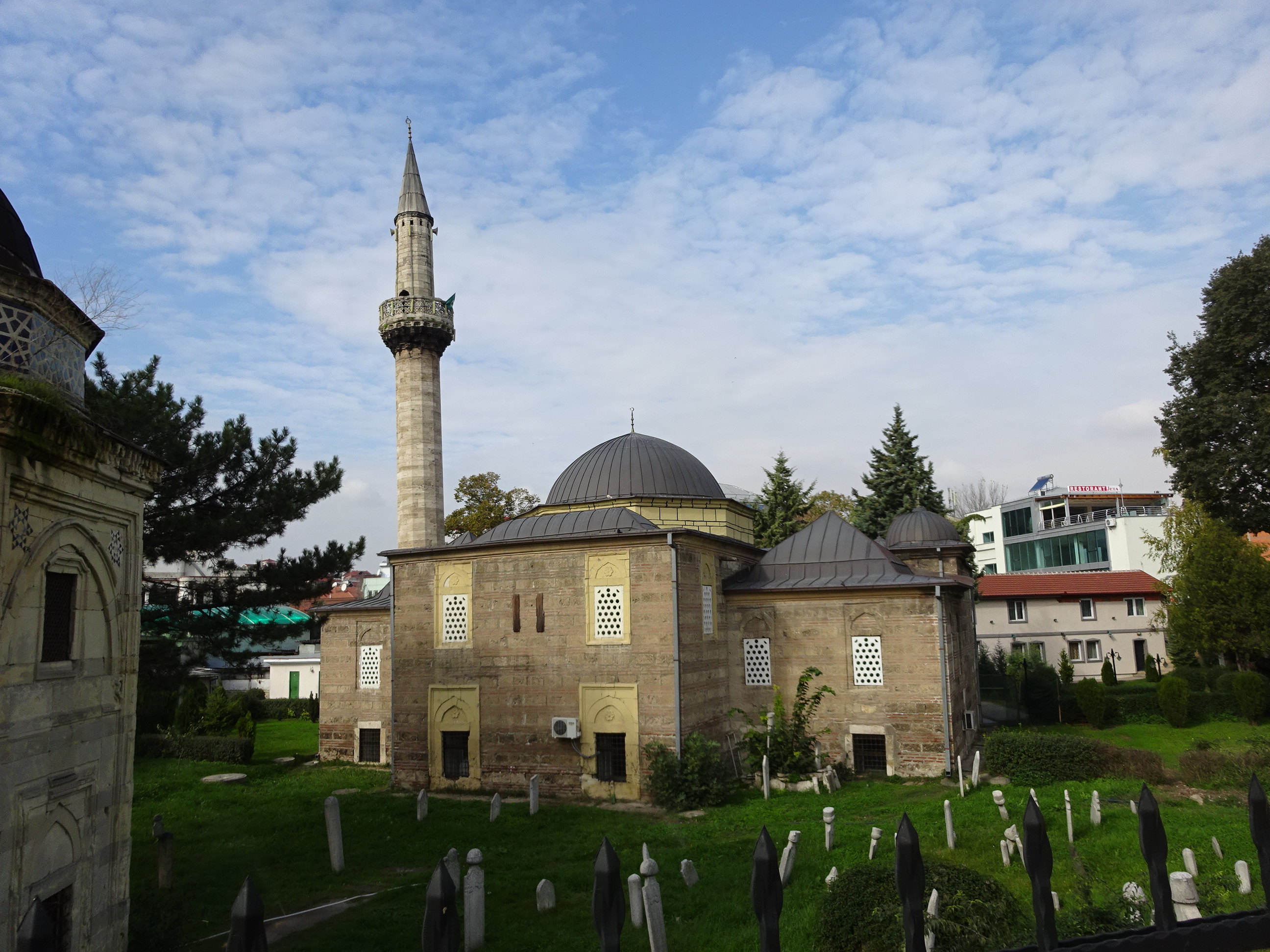 Исхак Бегова Џамија Скопје Ова е фотографија на споменик на културата во Македонија со типски код: A02This is a a photo of a cultural monument in North Macedonia with type id: A02